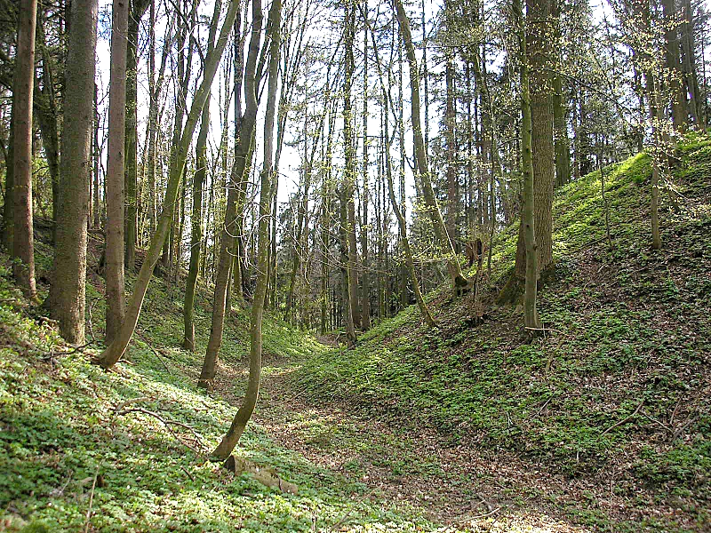 Hochmittelalterlicher Burgstall (Turmhügelburg) Bachern (Stadt Friedberg, Landkreis Aichach-Friedberg, Bayerisch-Schwaben). Der Halsgraben der Hauptburg. Blick nach Südwesten. Eigene Aufnahme, April 2008 / High Middle Ages motte-and-bailey castle Bachern near Friedberg (Bavaria, Germany). The moat of the central castle, looking south west. Own photo, April 2008